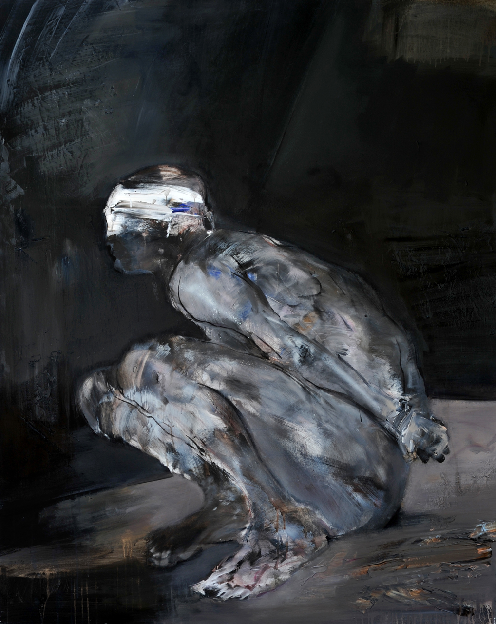 Franta, Rukojmí (2009), akryl, plátno 163 x 130 cm